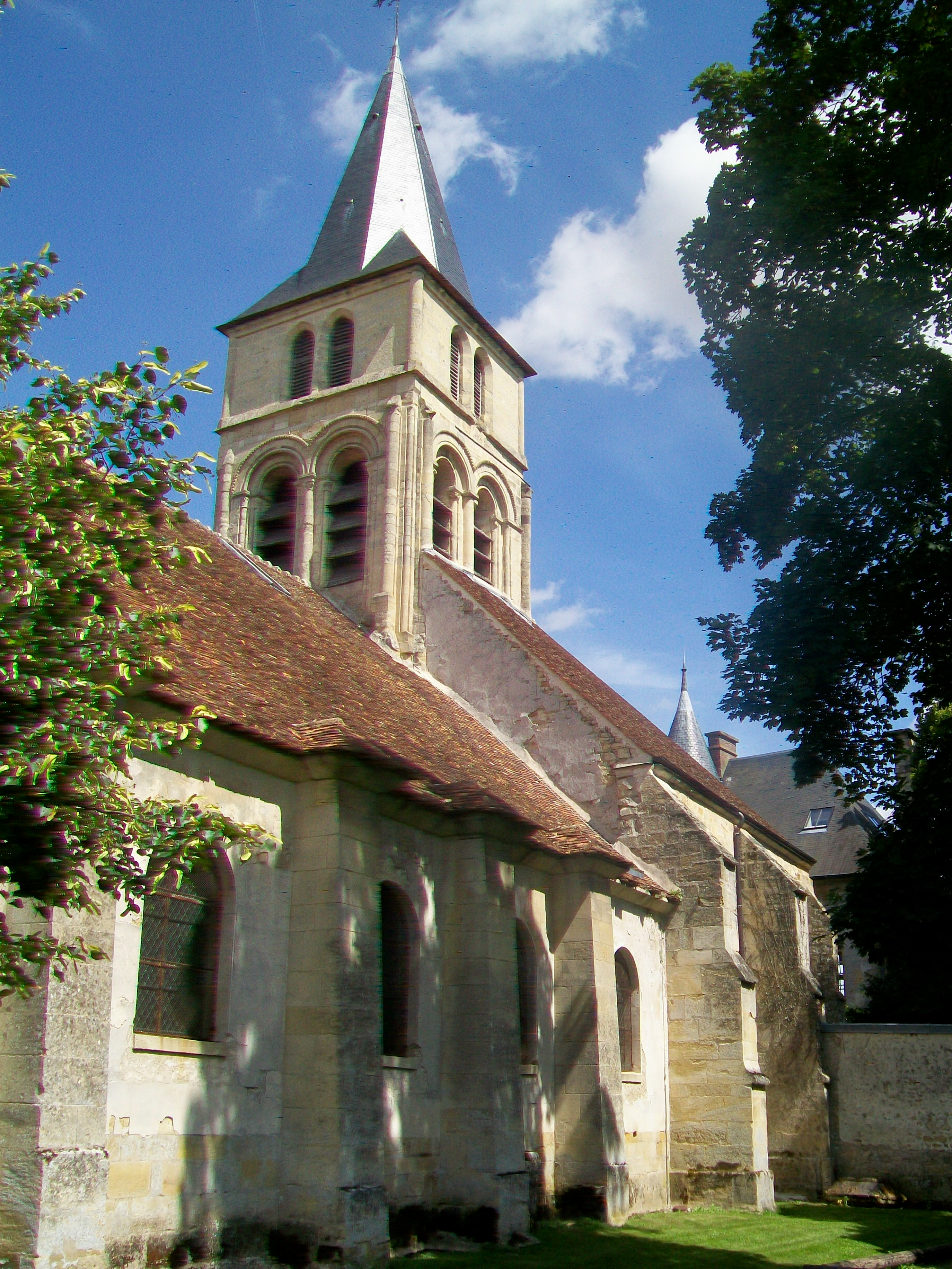 La façade sud, vue depuis le sud-ouest.